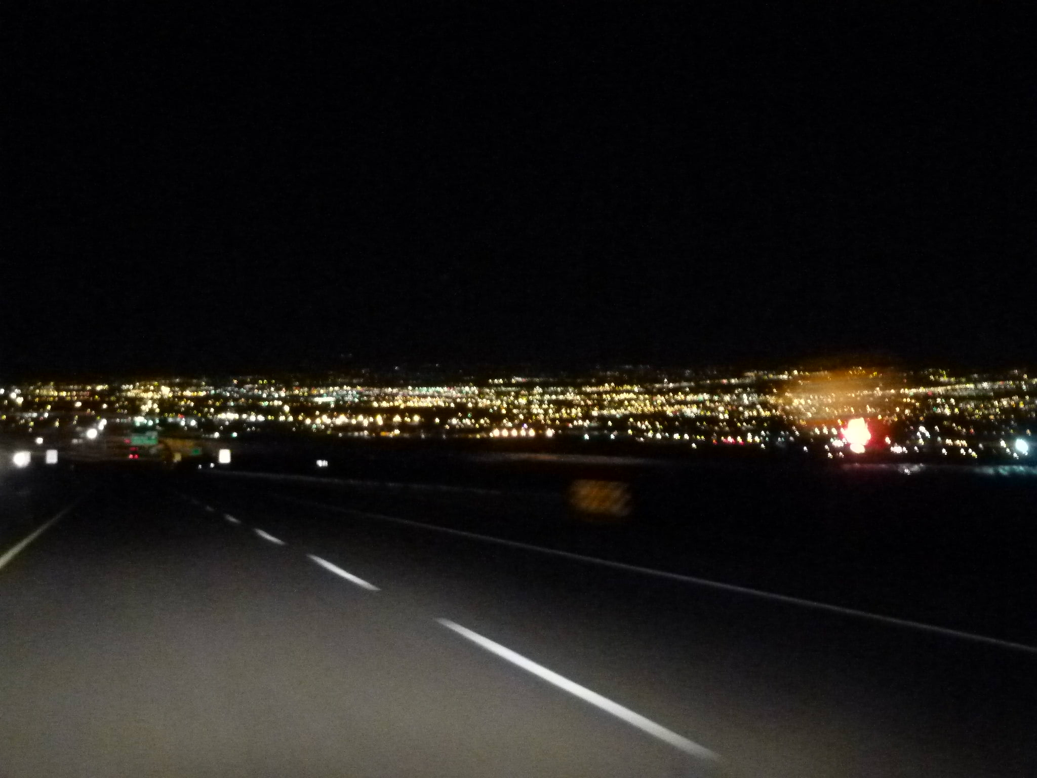 Albuquerque, NM: From Interstate 40, 11 PM:2011